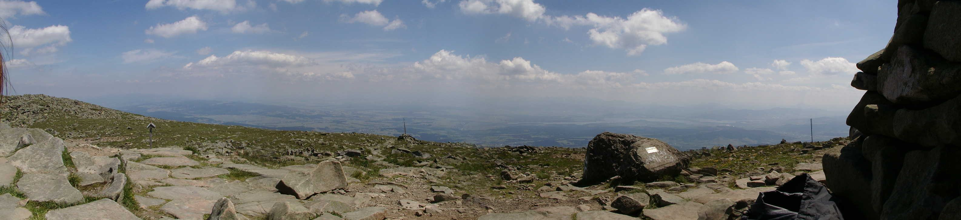 Panorama z Diablaka na Orawę,Kacper Kalaga